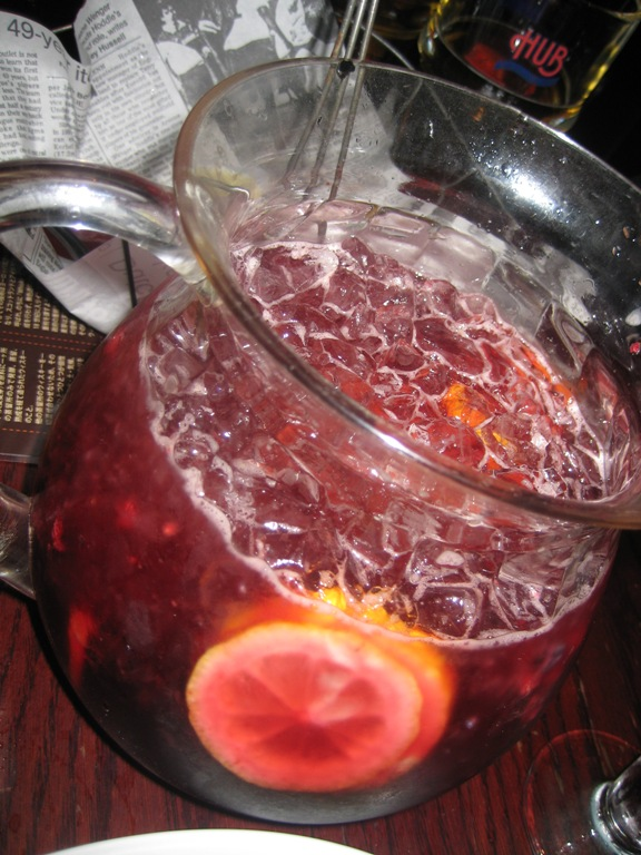 090908 - The Hub in Shinjuku, Tokyo Japan